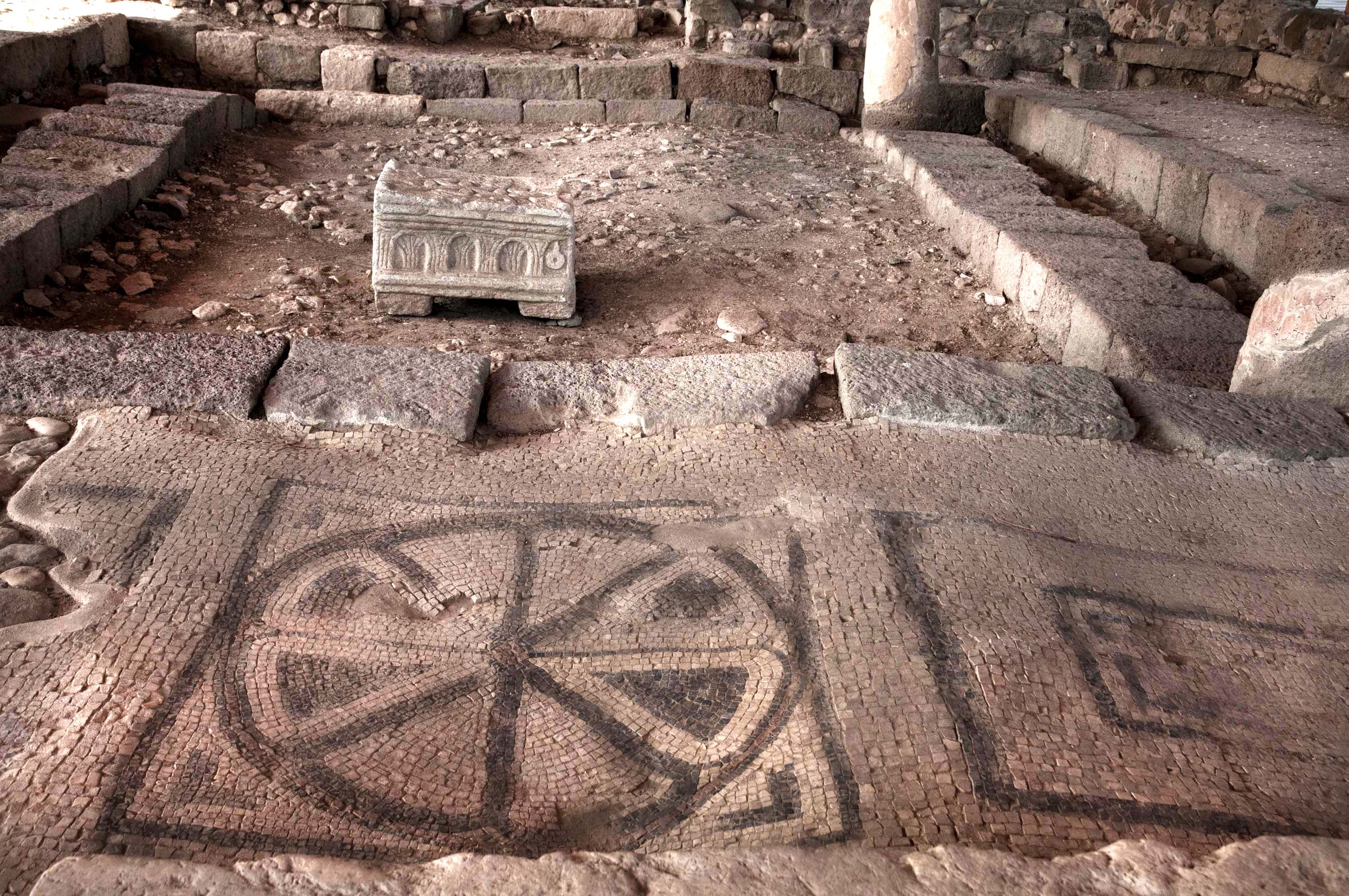 עיר קדומה בגליל, ששכנה לחוף הכנרת, בדרום בקעת גינוסר, סמוך ליישוב מגדל של היום המשמר את שמה. עד להקמת העיר טבריה בשנת 20 לספירה, הייתה מגדלא המרכז העירוני היחיד בחוף המערבי של הכנרת.